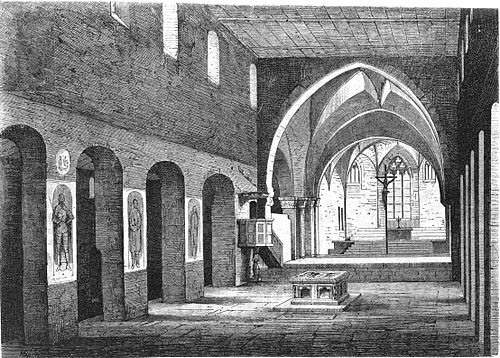 Hohenstaufengräber im Langhaus der Klosterkirche Lorch (Holzschnitt eines unbekannten Künstlers)